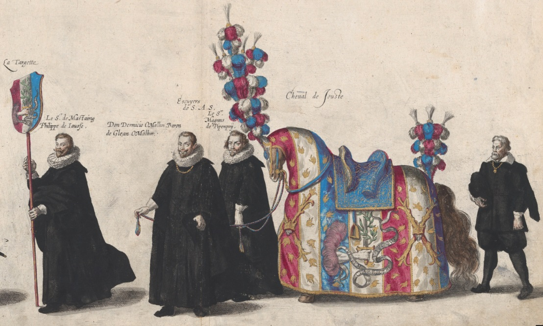 Pompes funèbres de l'archiduc Albert d'Autriche à Bruxelles / Série de 65 gravures d'un recueil relatant les funérailles d'Albert d'Autriche à Bruxelles le 11 mars 1622.